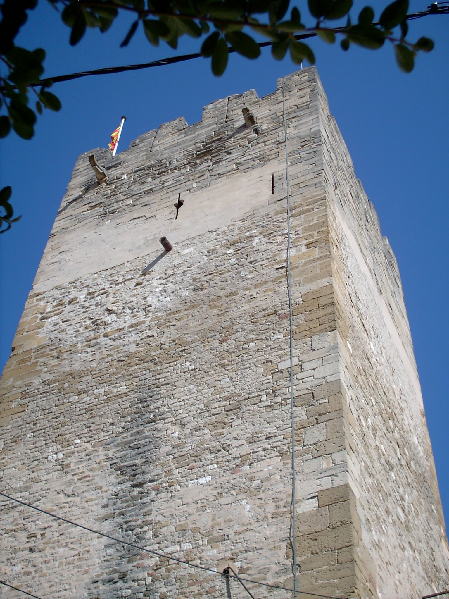 La Tour Clémentine à Monteux, Vaucluse